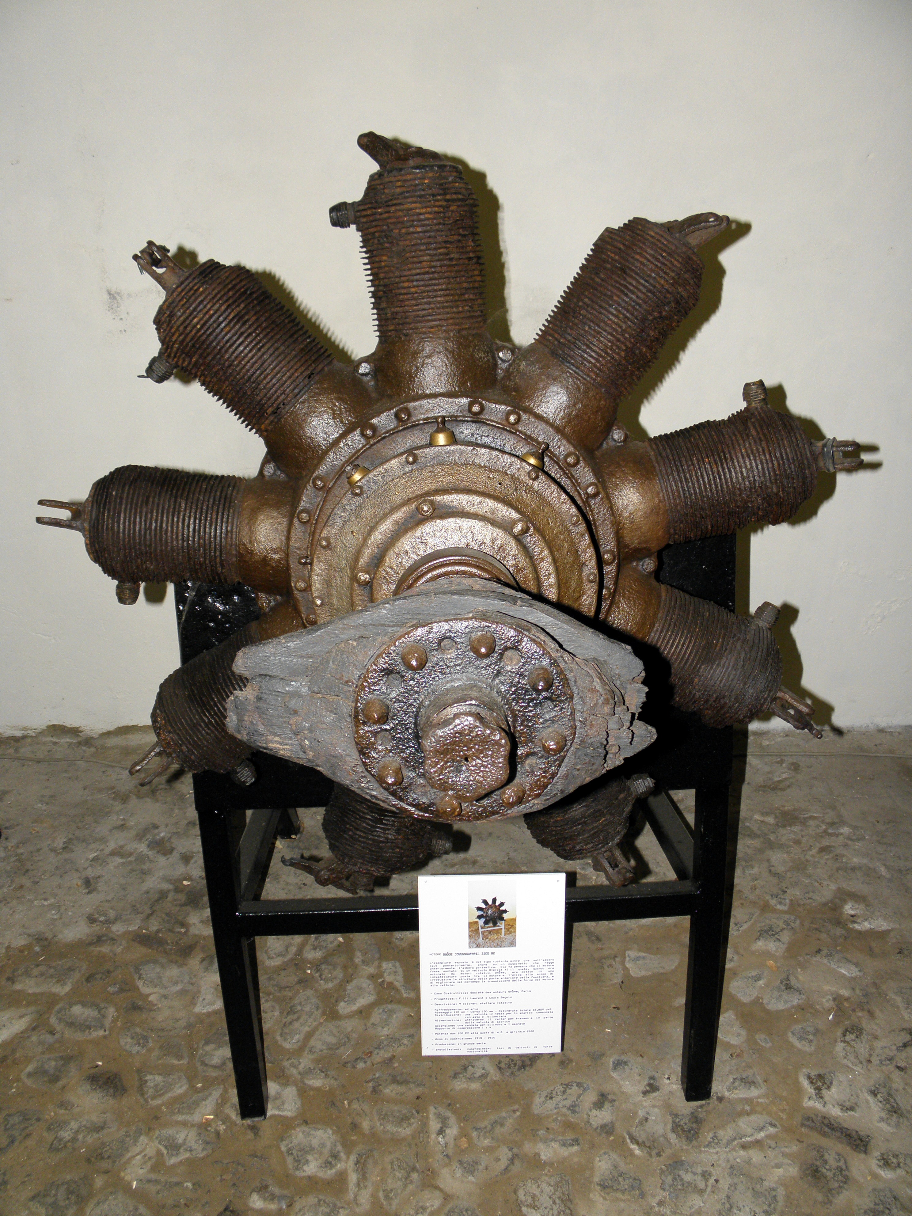 San Pelagio, frazione di Due carrare: Museo dell'aria e dello spazio, il motore aeronautico Gnome Monosoupape in esposizione al museo.